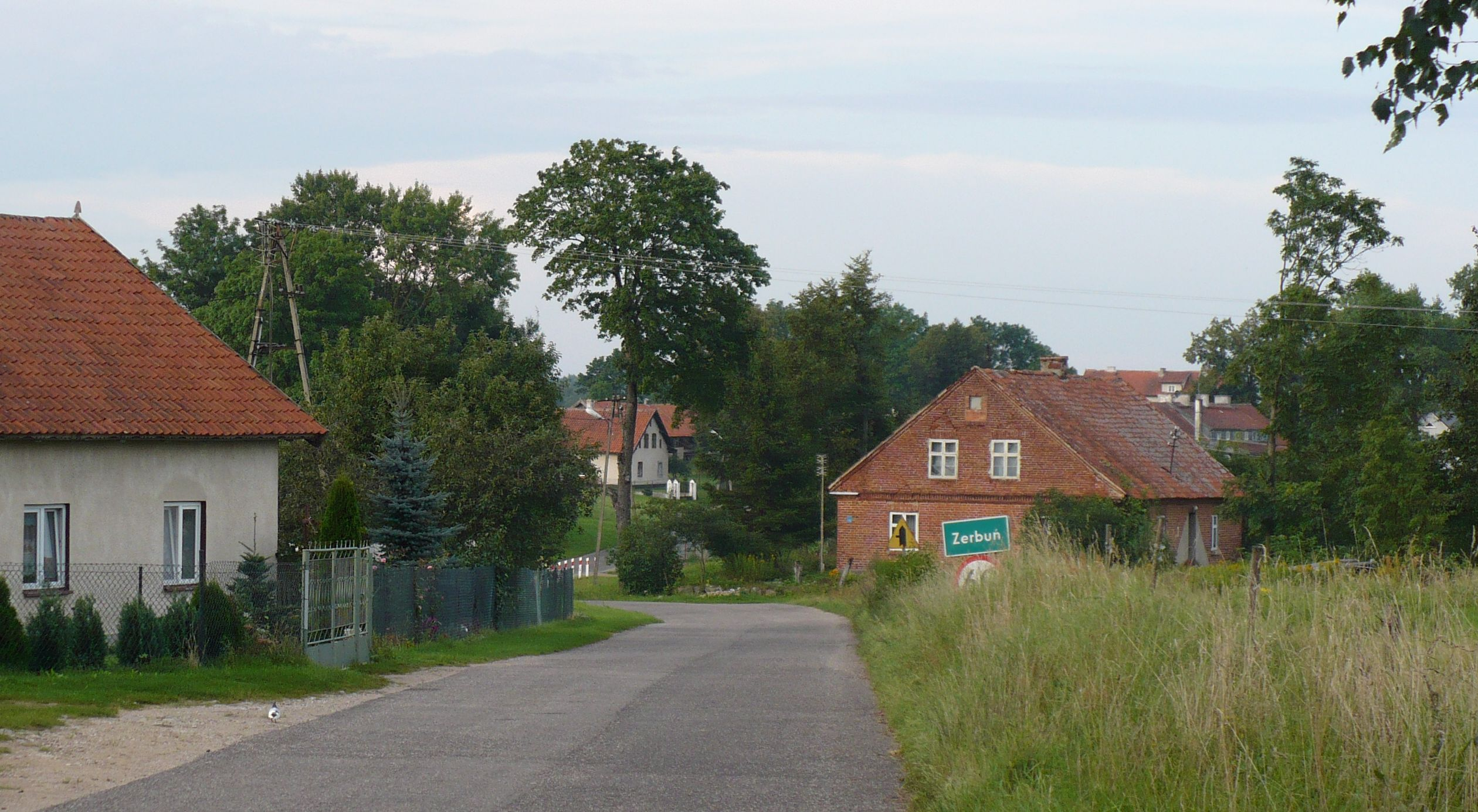 Wieś Zerbuń